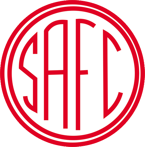 SAFC